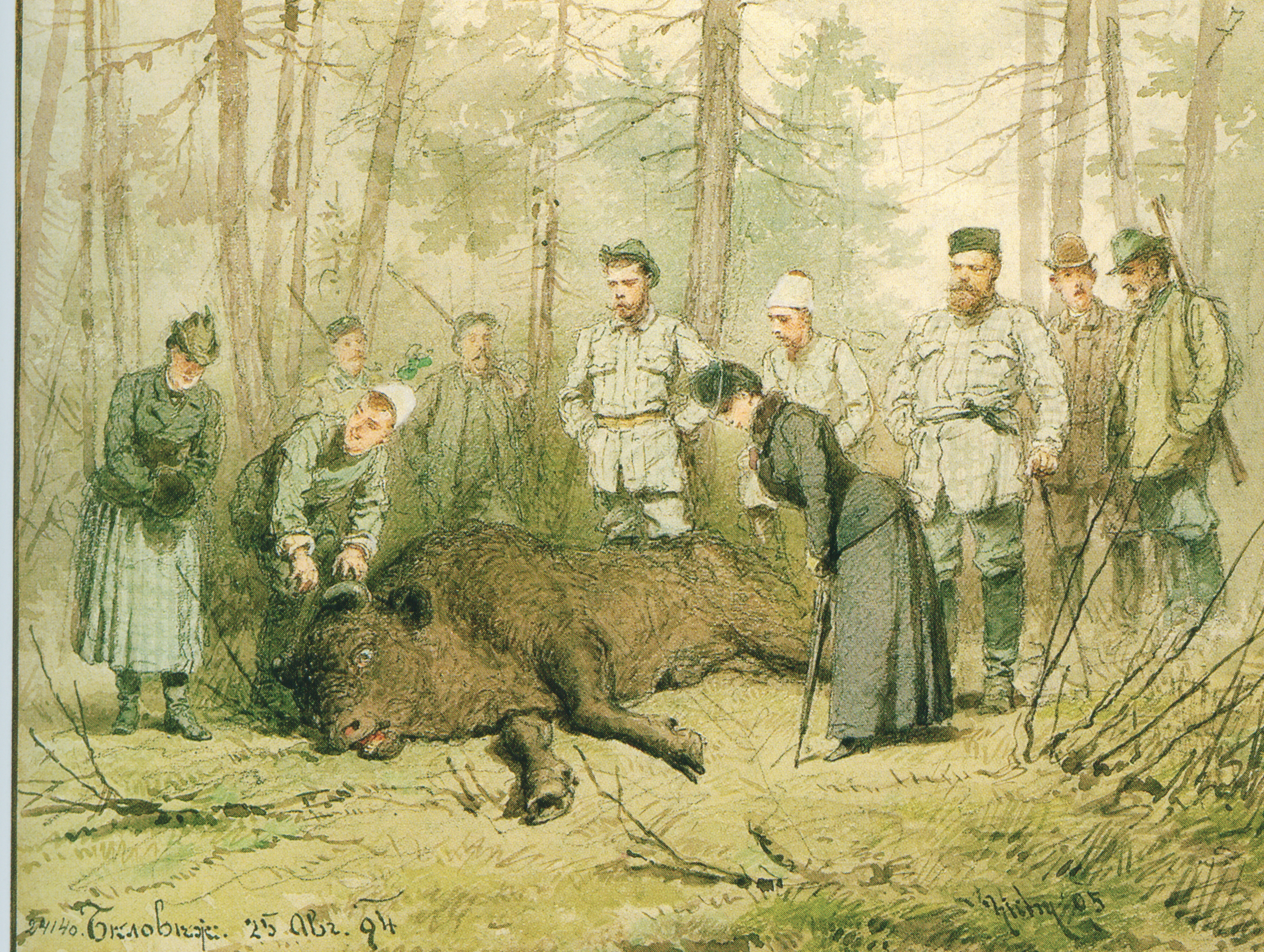 Александр III на охоте в Беловежской пуще 25 августа 1894